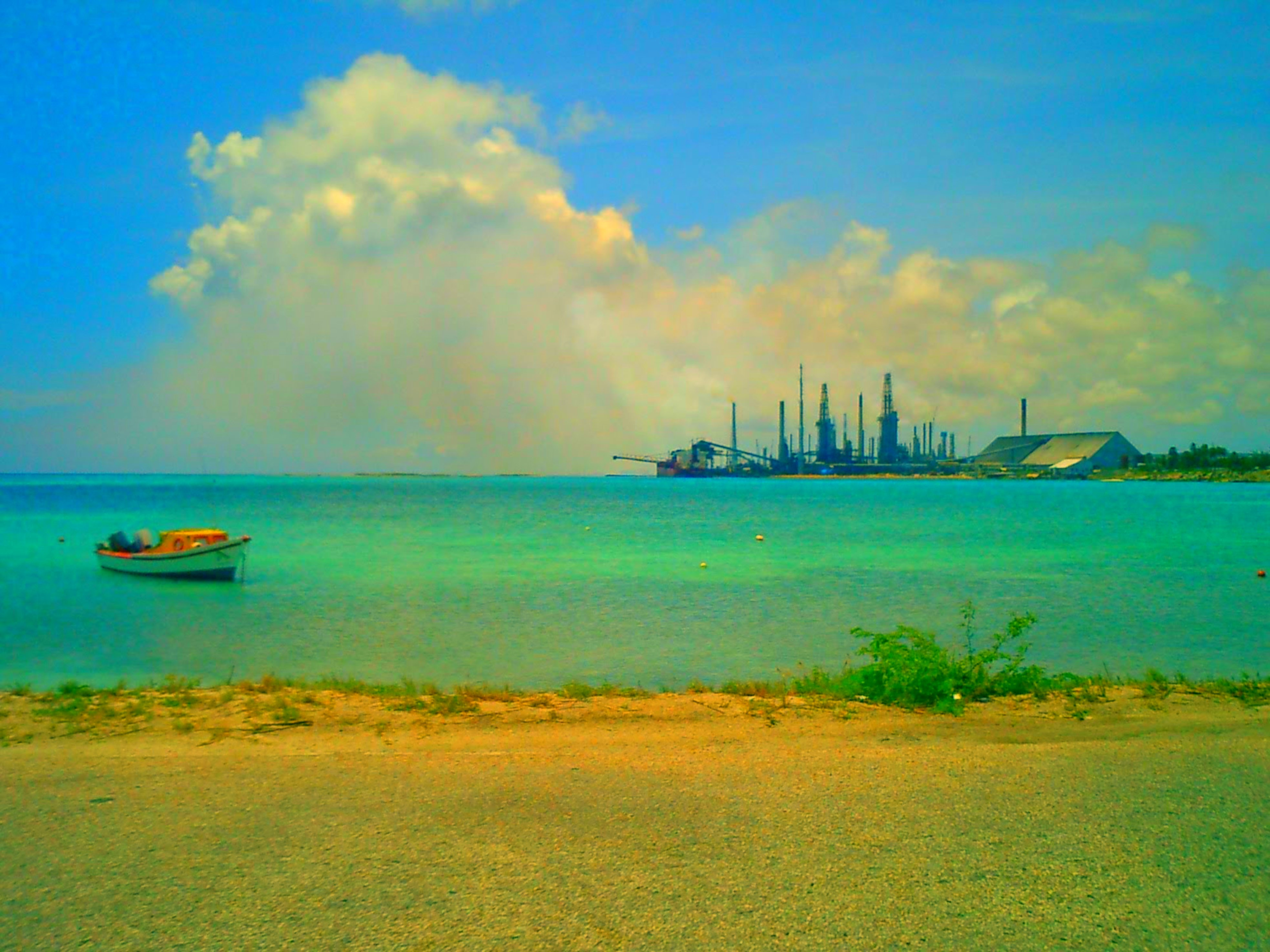 Beach in Seroe Colorado, Aruba Dutch Caribbean em 7 de setembro de 2003